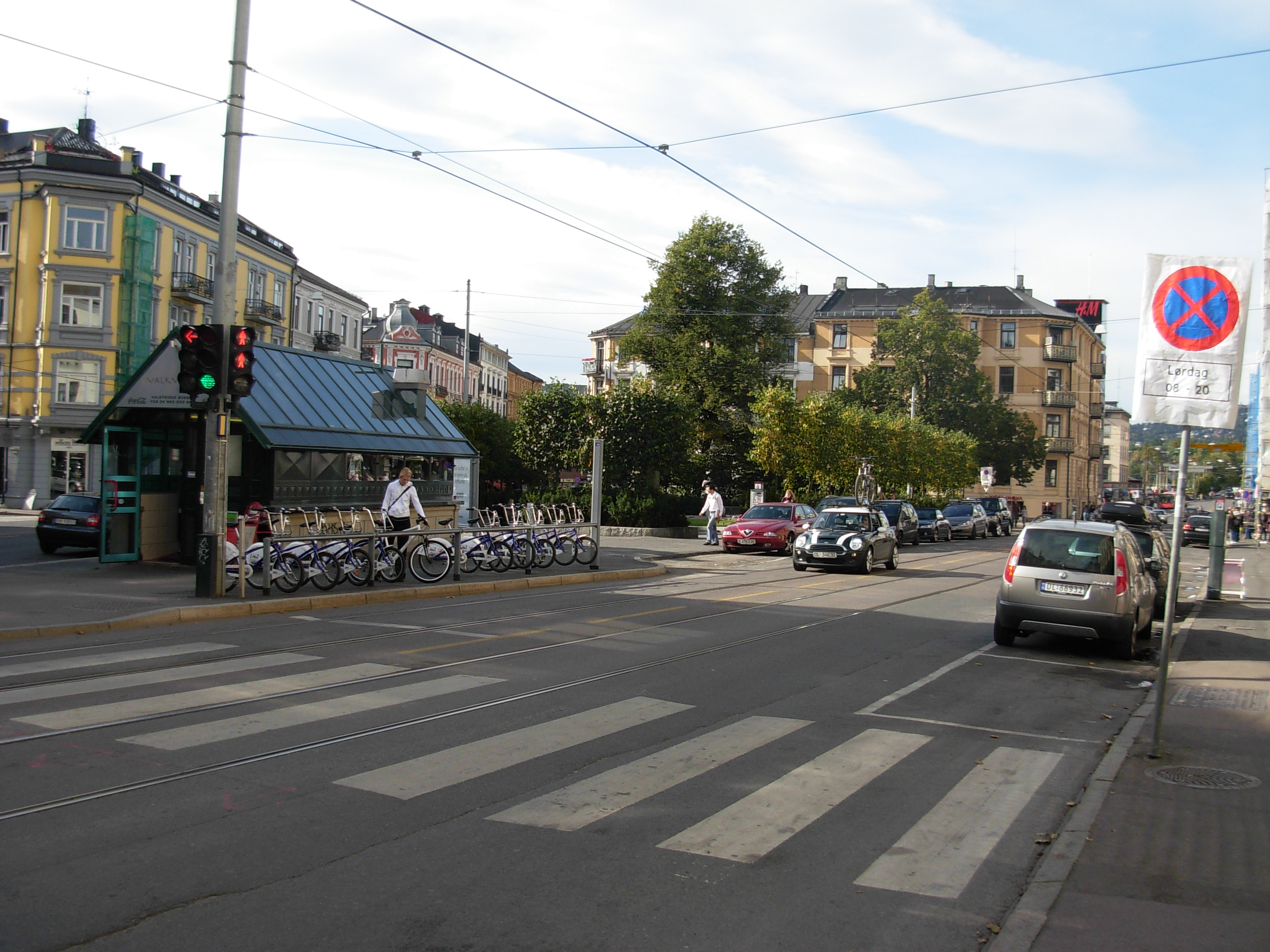 Valkyrie plass, Oslo